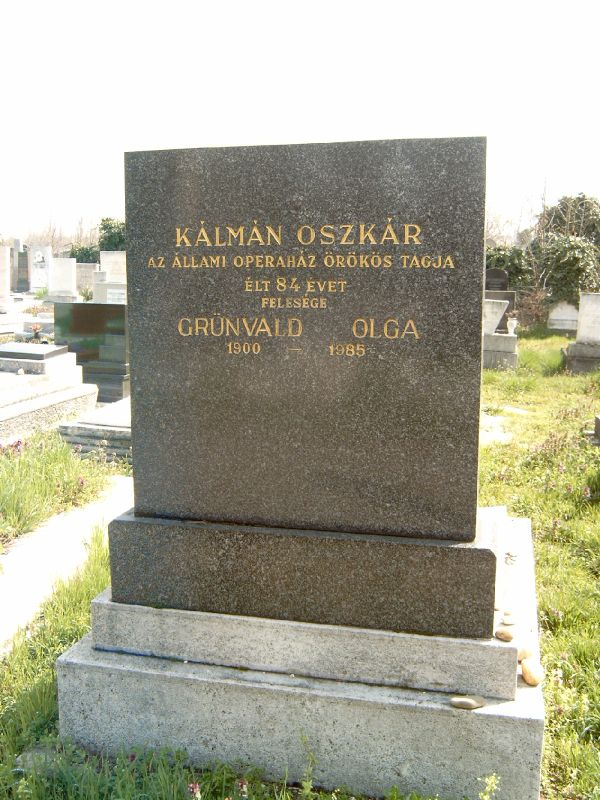 Kálmán Oszkár (Kisszentpéter, 1887. június 19. – Budapest, 1971. szeptember 17.) operaénekes (basszus) sírja Budapesten. Kozma utcai zsidó temető: 5B-1-16